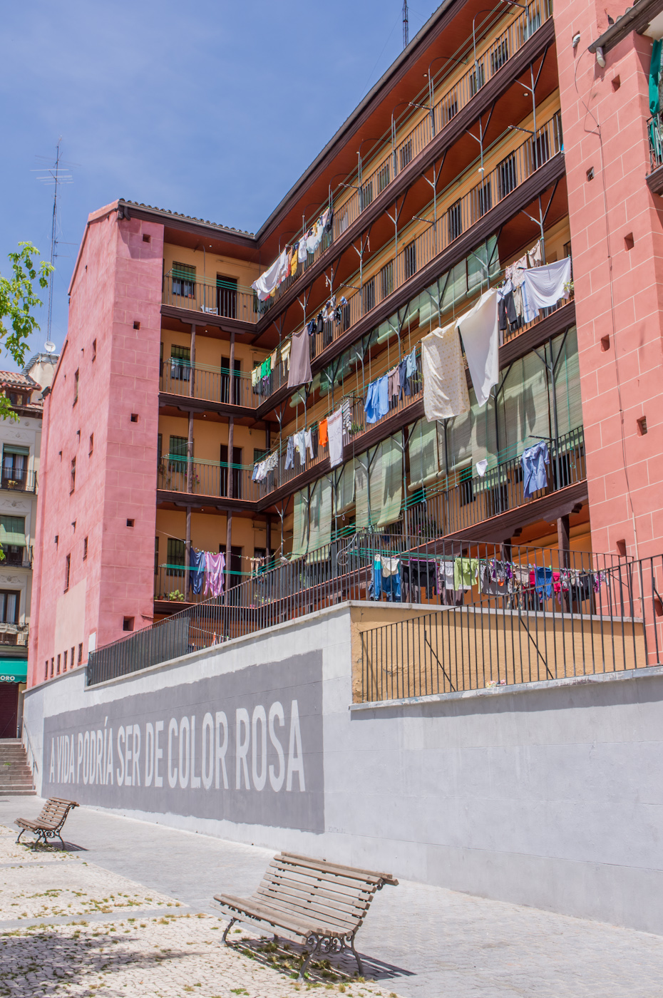 Corrala, Lavapiés, Madrid, España.